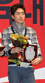 제17회 코카콜라 체육대상 시상식